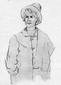 Разумихин. Иллюстрация к роману Достоевского "Преступление и наказание". Художник Боклевский П. М.